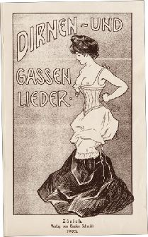 Buchtitel des Werks Dirnen- und Gassenlieder, dessen Herausgeber Egon Hugo Strasburger (1877-1952) war. Es erschien 1903 in Zürich beim Caesar Schmidt-Verlag.